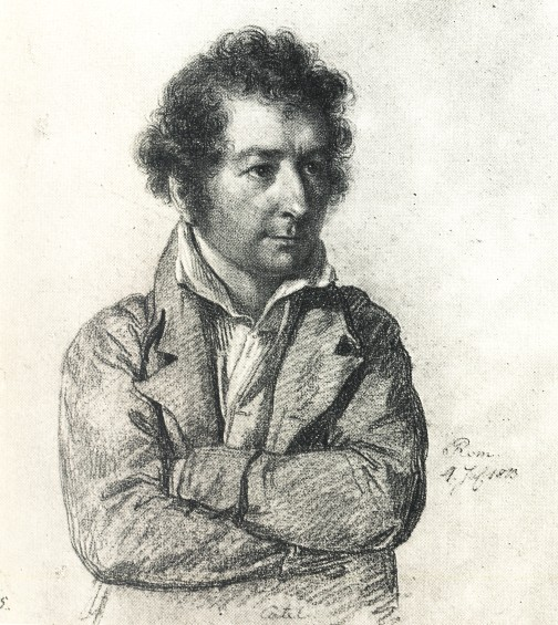 Bildnis des Malers Franz Ludwig Catel